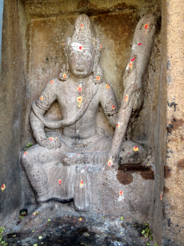 லகுலீசர் புடைப்புச் சிற்பம் - அரிட்டாப்பட்டி